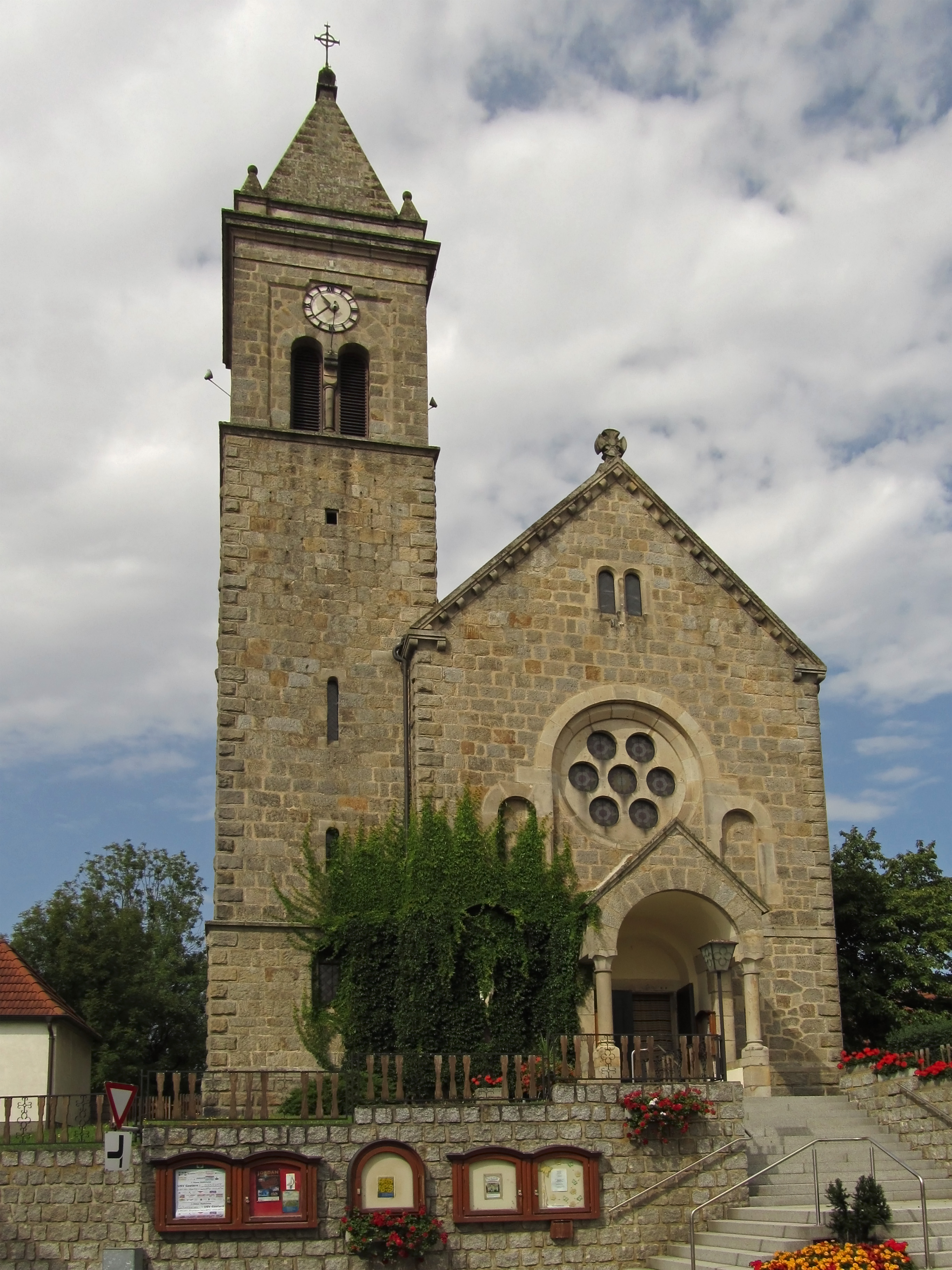 Die neuromanische Saalkirche mit seitlichem Frontturm wurde 1904/05 erbaut.